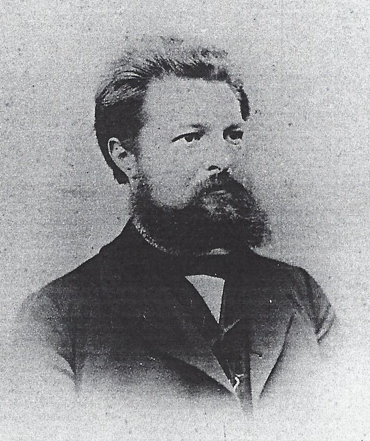 Porträtfotografie von Franz Rang (1831-1893)